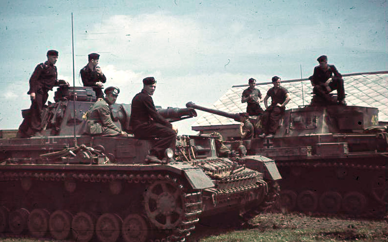 Deutsche Panzer in Bereitschaft vor dem Angriff Ukraine Sommer 1941